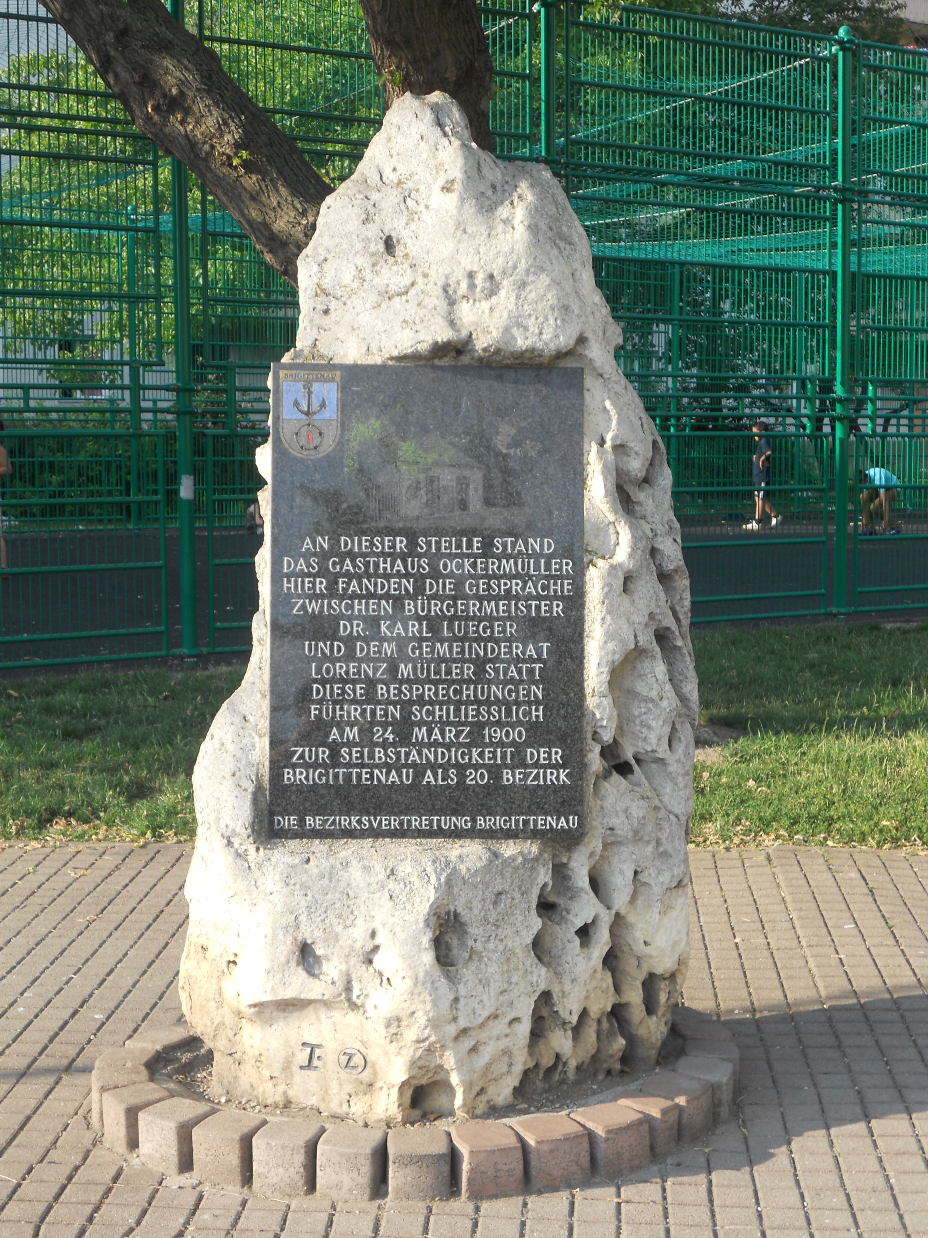 Gedenkstein an das Gasthaus Ockermüller, wo die Gründung des Bezirks Brigittenau beschlossen wurde